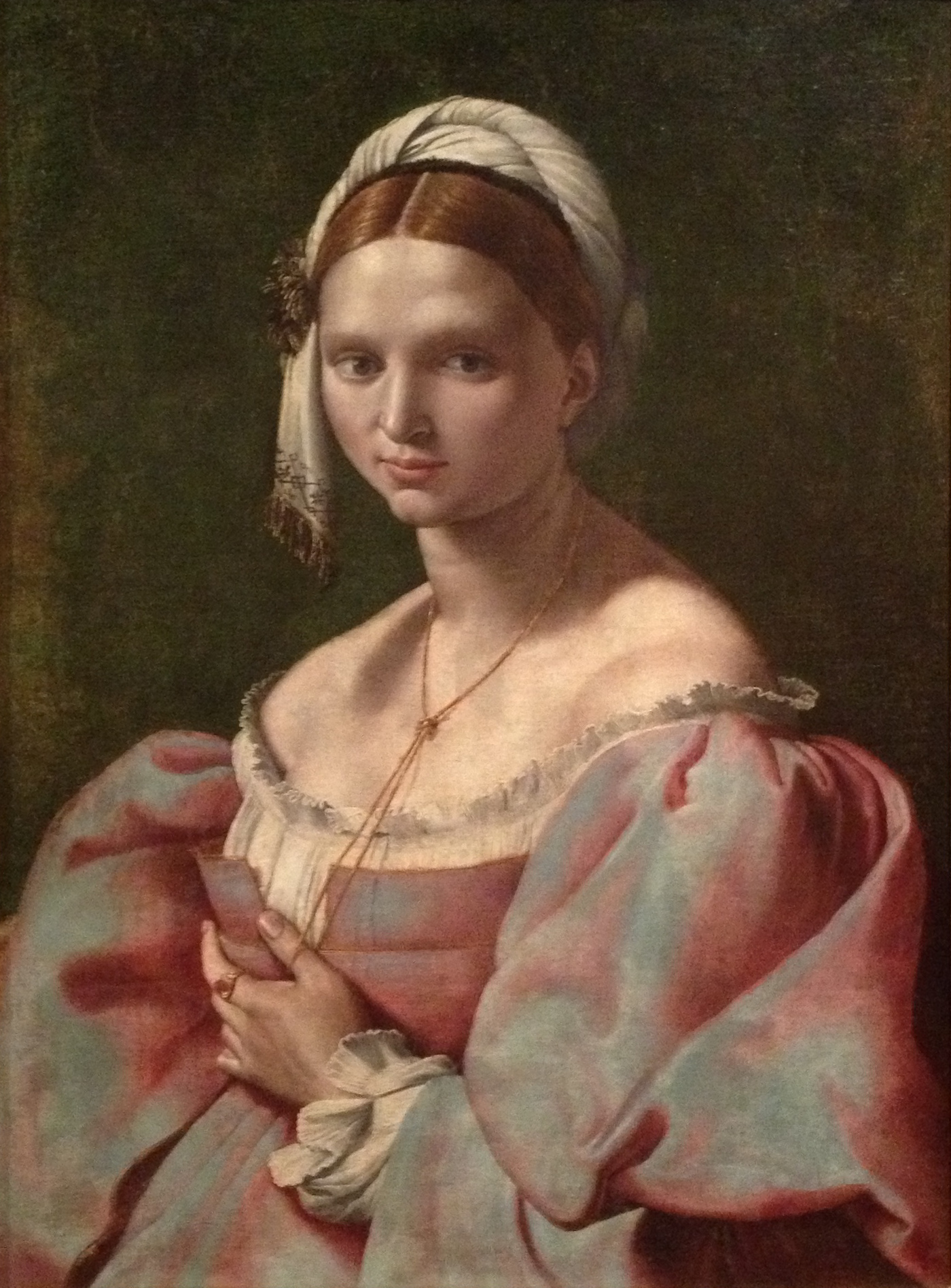 Ritratto di giovane donna conservato al Museo Calouste Gulbenkian di Lisbona (olio su tela, 76,5 x 57,5 cm) ispirato alla Velata del Raffaello e contraddistinto dalla presenza di un laccio annodato al collo e teso dal pollice della mano sinistra